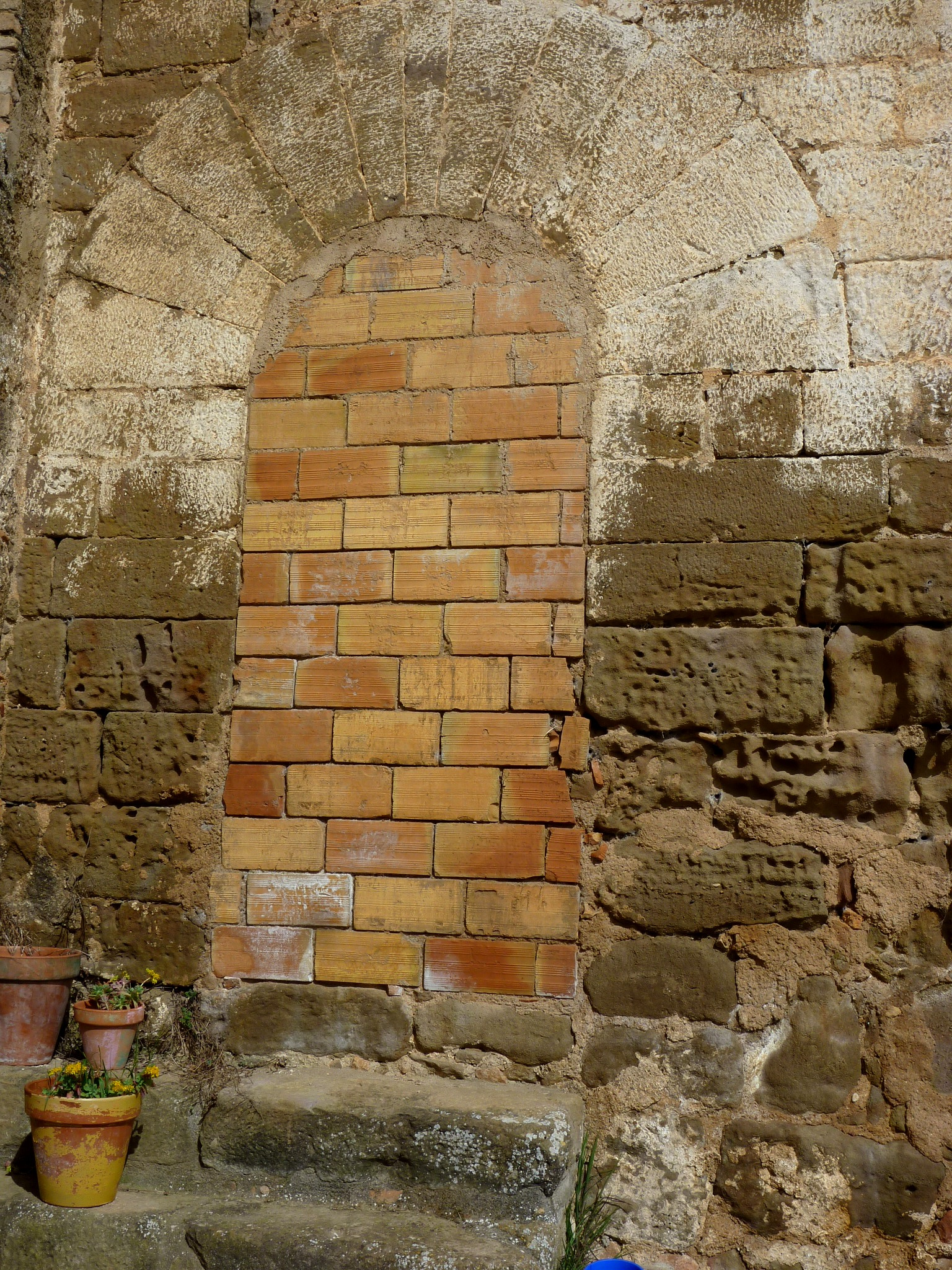 Capella de la Mare de Déu del Remei de la masia de la Llena (Castellar de la Ribera): portal de la capella tapiat